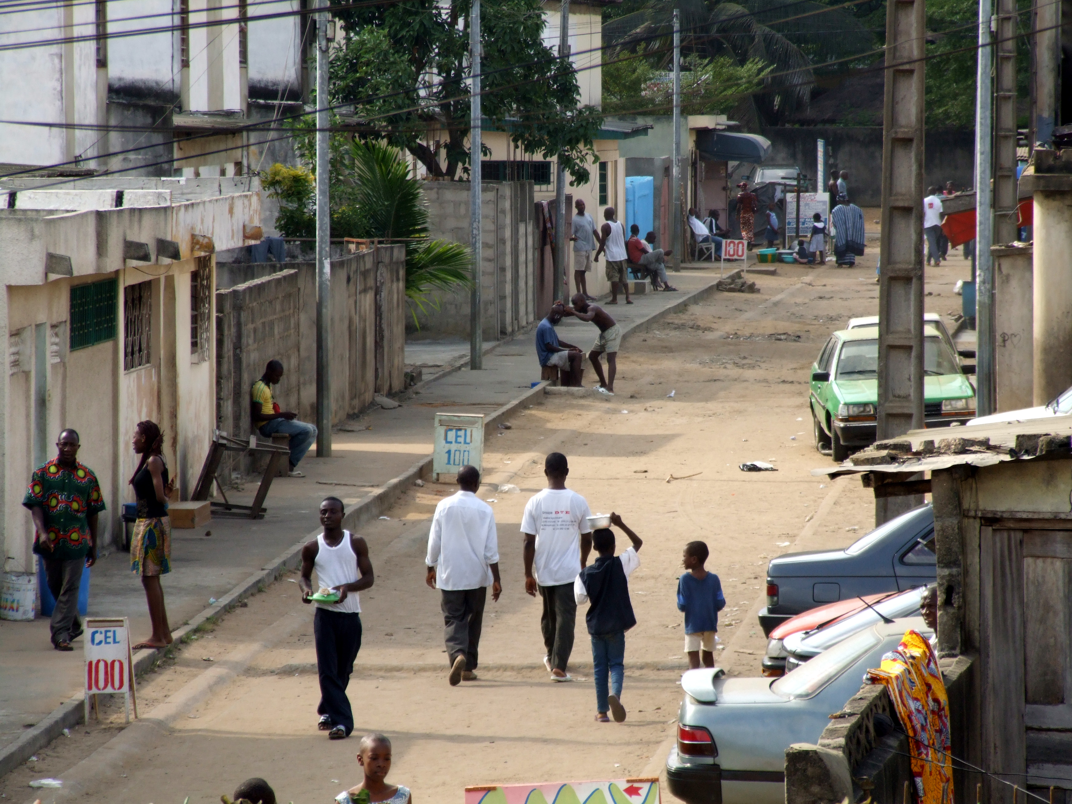 Yopougon